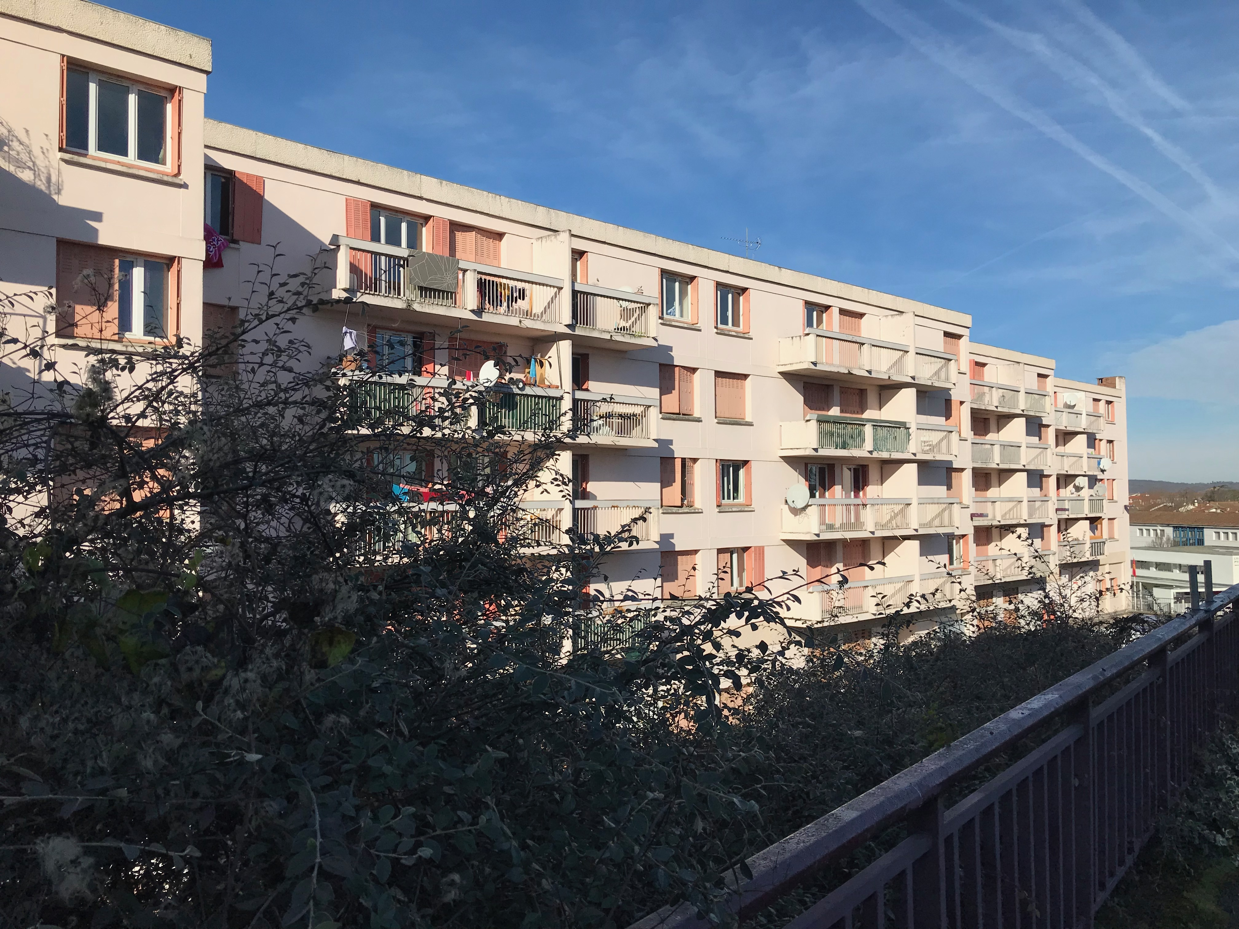 La barre HLM "H" du quartier de la Gloriette à Pamiers, destinée à être détruite dans le cadre de la politique de rénovation urbaine